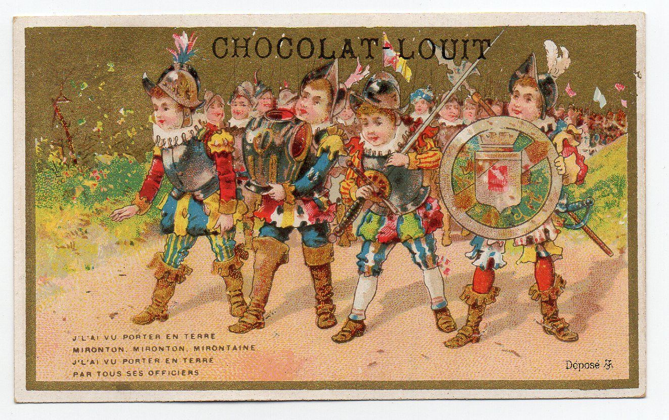 Carte publicitaire de collection en chromolithographie du chocolat Louit sur le thème de la chanson enfantine Malbrough s'en va-t-en guerre.